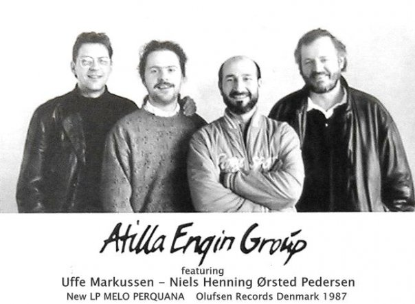 Atilla Engin arşivinden